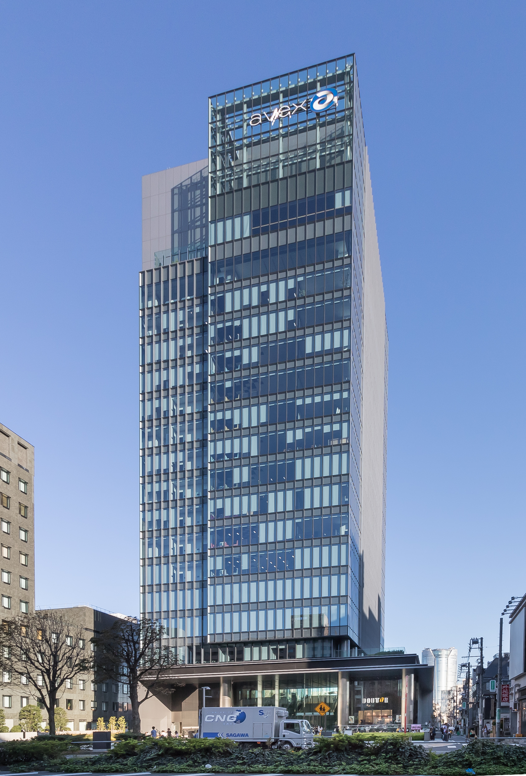 エイベックス本社ビル（東京都港区）